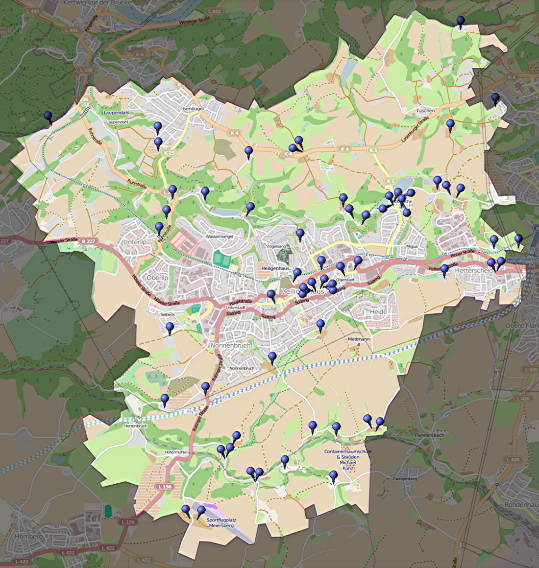 Karte der Lage aller Baudenkmäler in Heiligenhaus, Stand 2011